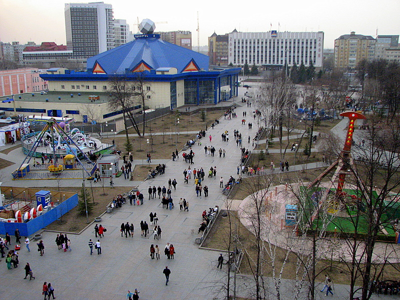 Цветной (Пешеходный) бульвар в Тюмени